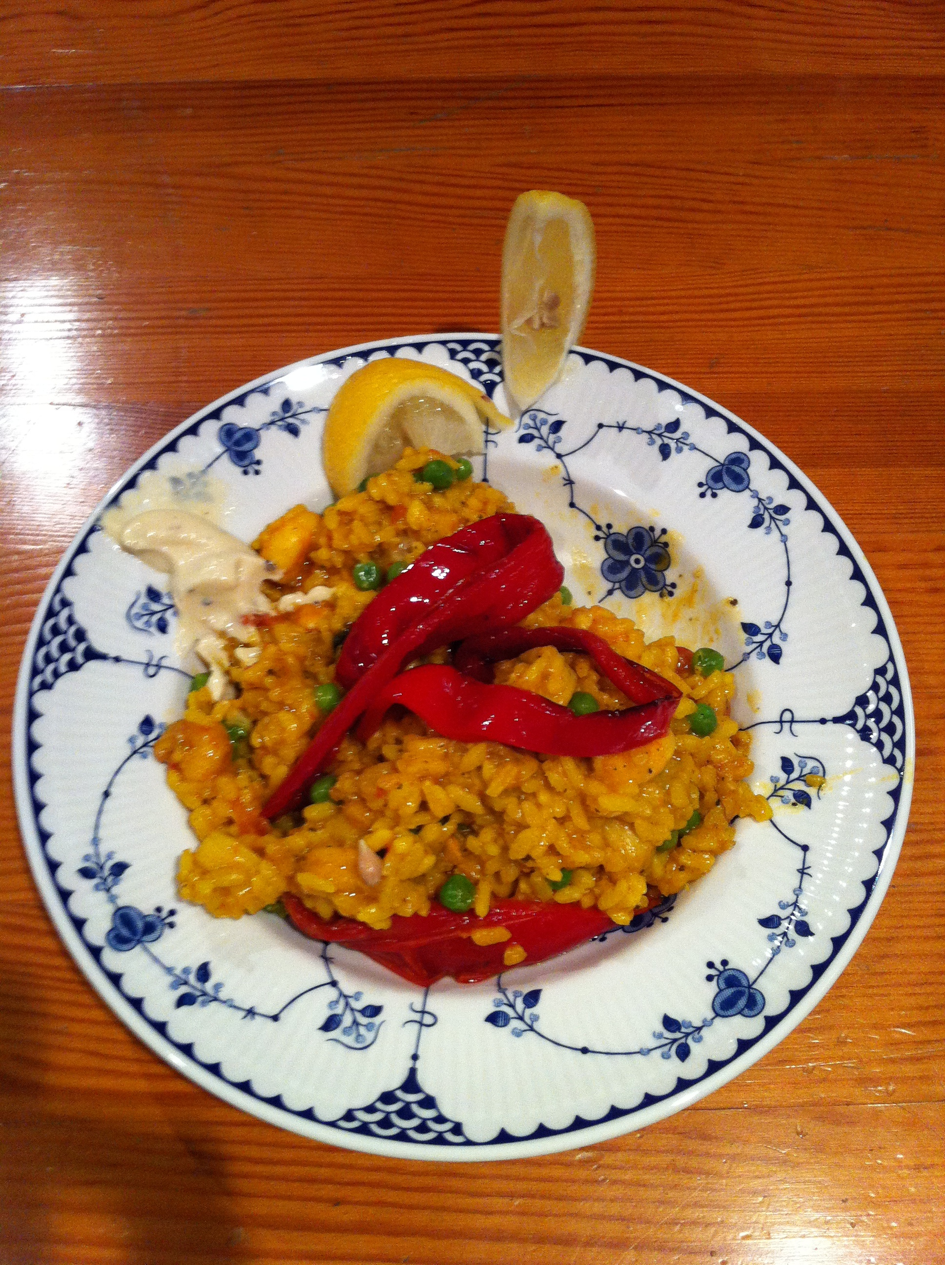 Paella